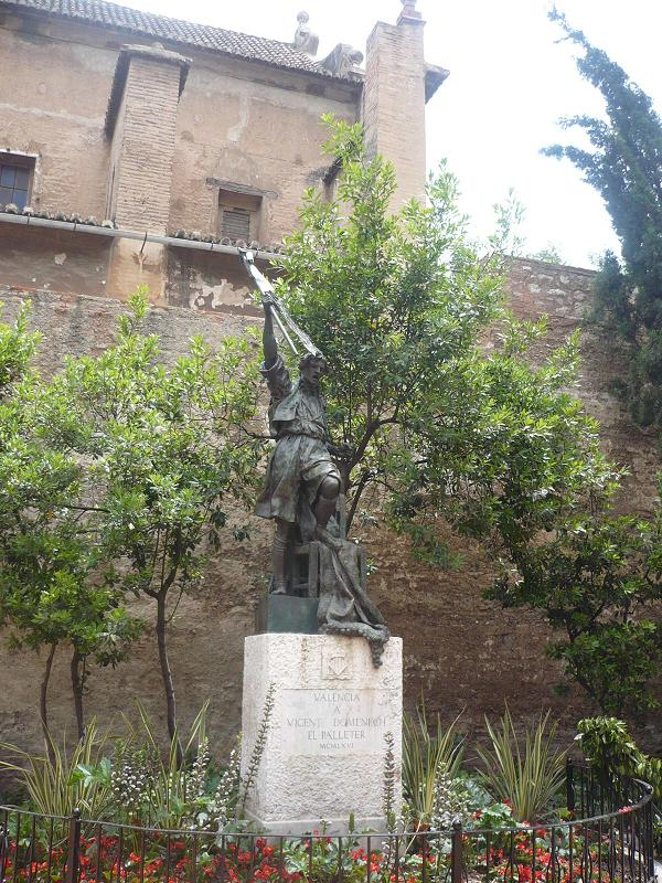 Estatua a Vicente Domenech "El Palleter en Valencia, España.